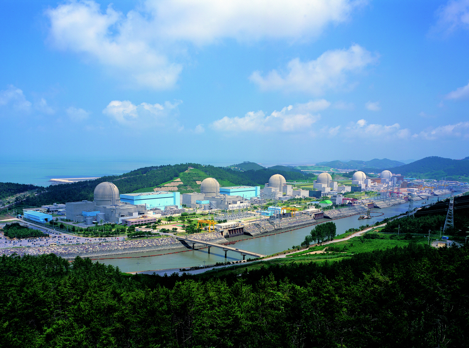 Korea Yonggwang Nuclear Power Plant Photo Credit: Korea Yonggwang NPP